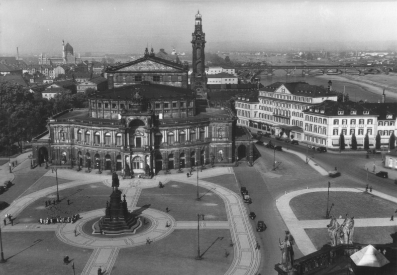 Dresden, Semperoper am Theaterplatz um 1900. Hinter der Oper der Schlot des Heizkraftwerkes, der stilistisch angepasst wurde (neobarock). Rechts, zur Elbe hin, das alte Hotel Bellevue.